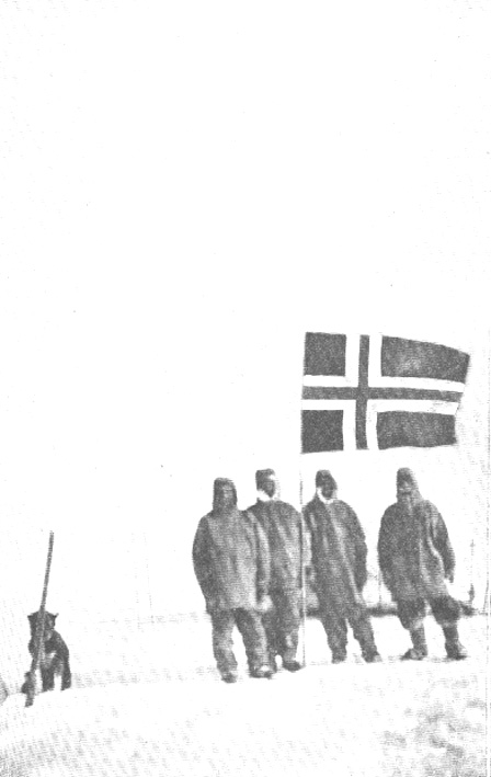 Die Hunde im Südpol angelangt